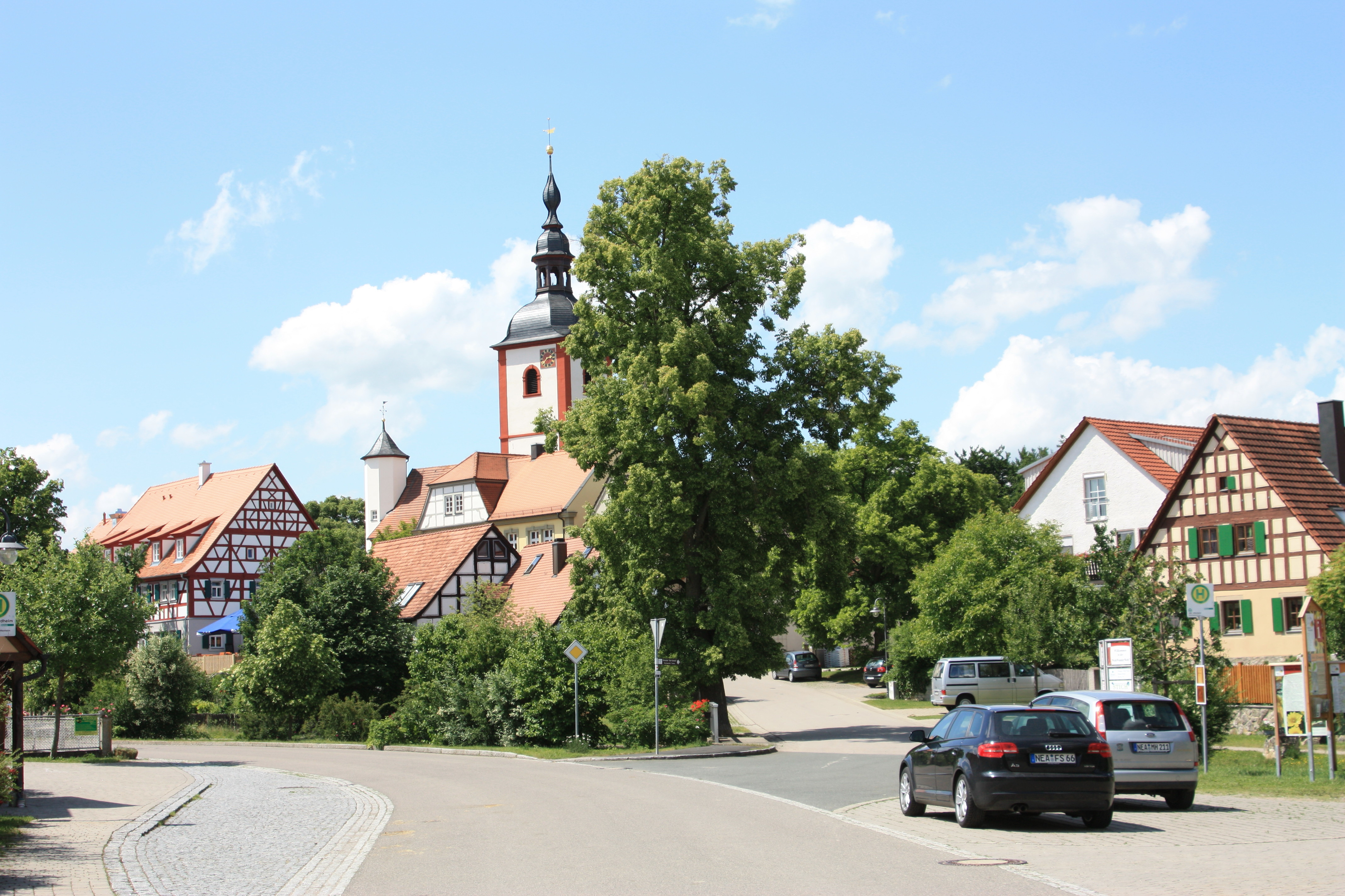 Ortsmitte